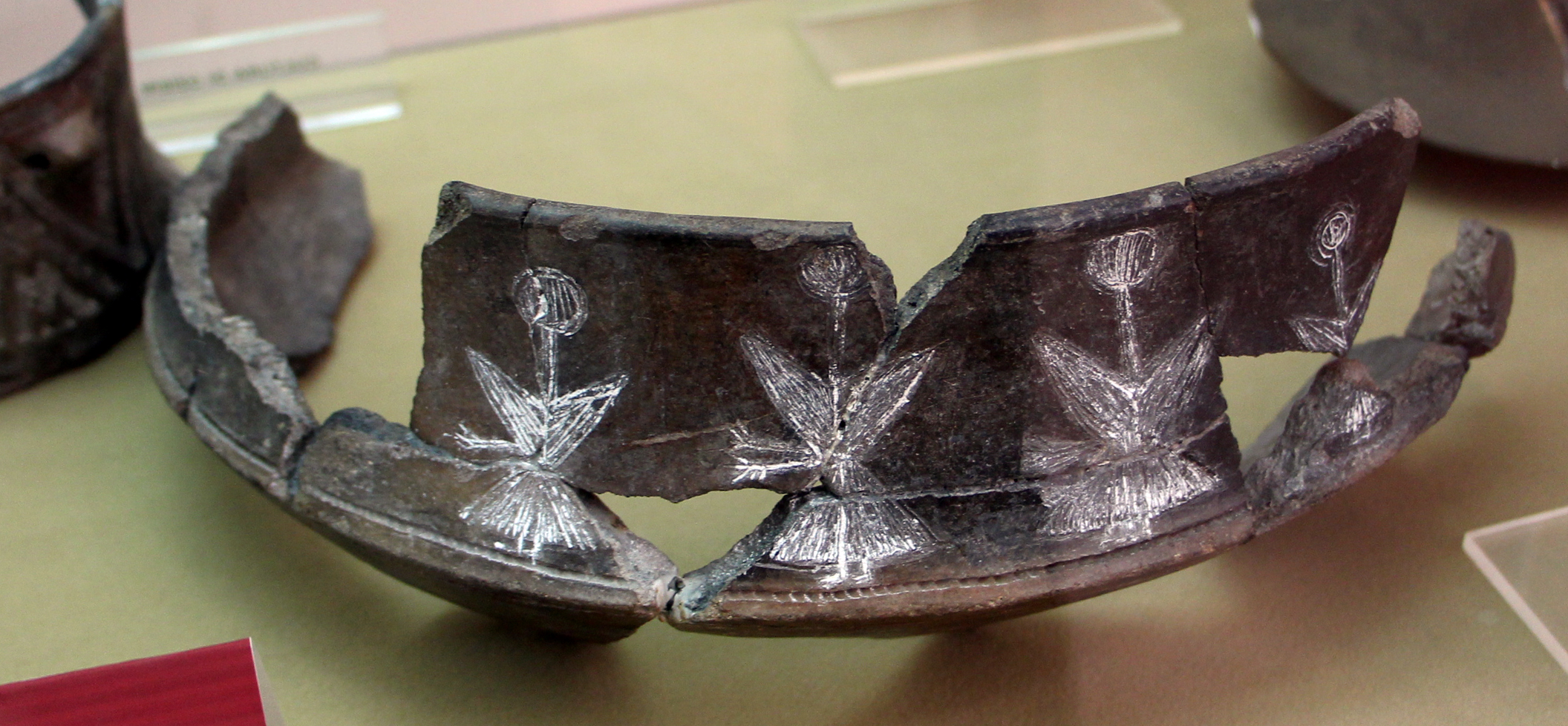 Museo archeologico nazionale G.A. Sanna - MIBAC The making of this document was supported by Wikimedia CH. (Submit your project!) For all the files concerned, please see the category Supported by Wikimedia CH. This is a photo of a monument which is part of cultural heritage of Italy.